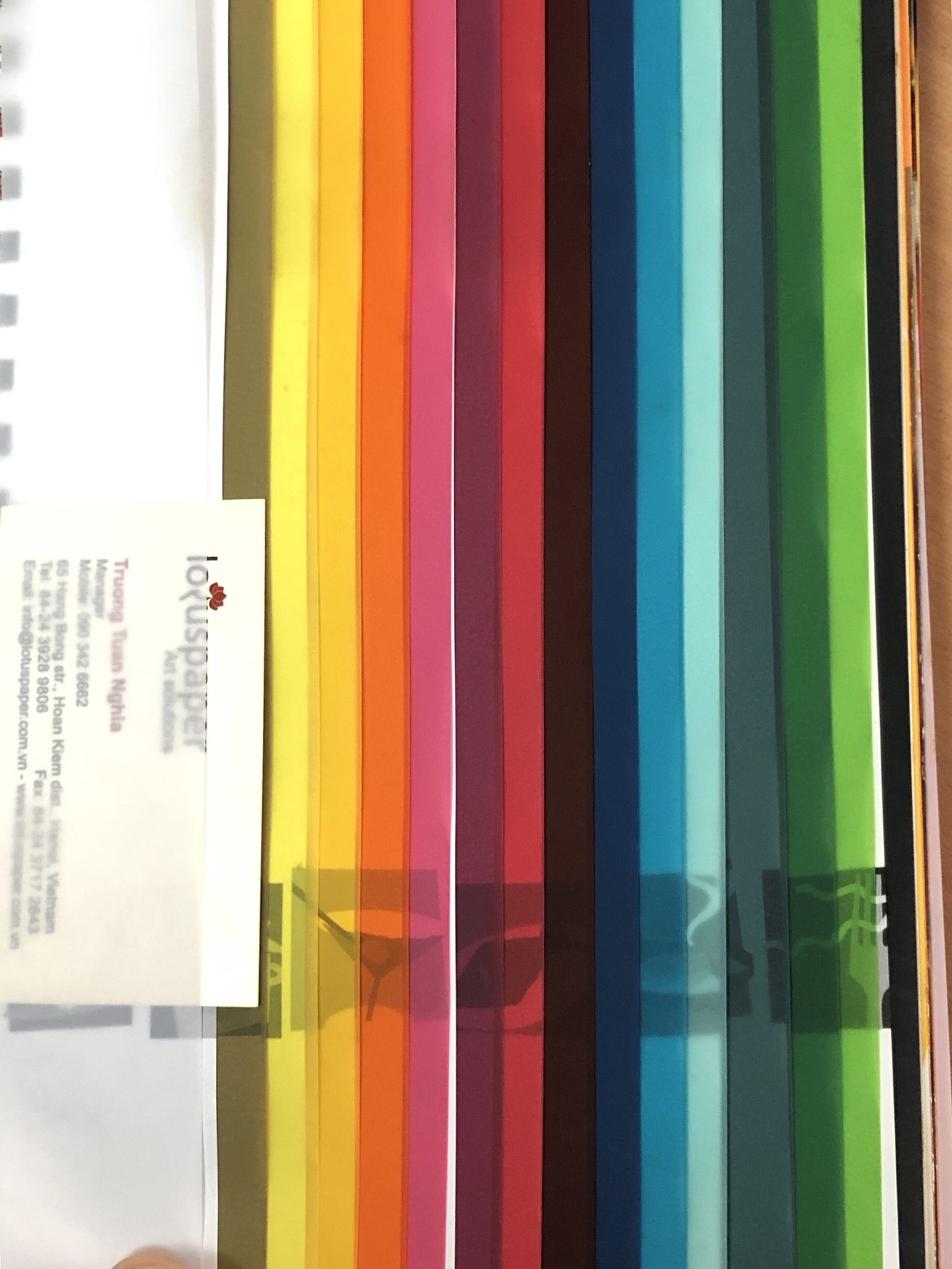 Mẫu giấy can màu Schoellershammer